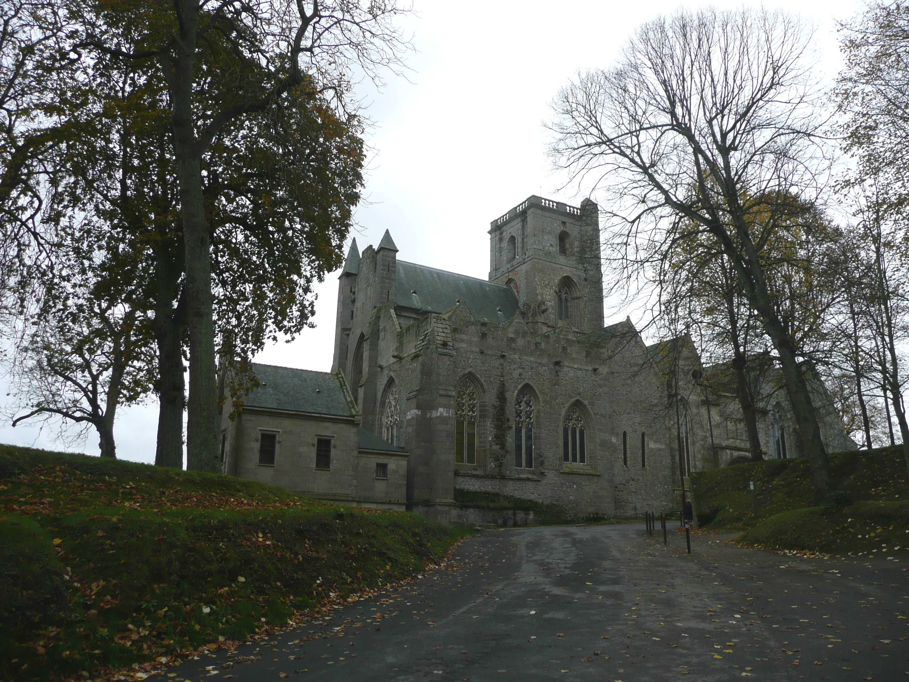 photographie de la collégiale Notre Dame de Lamballe